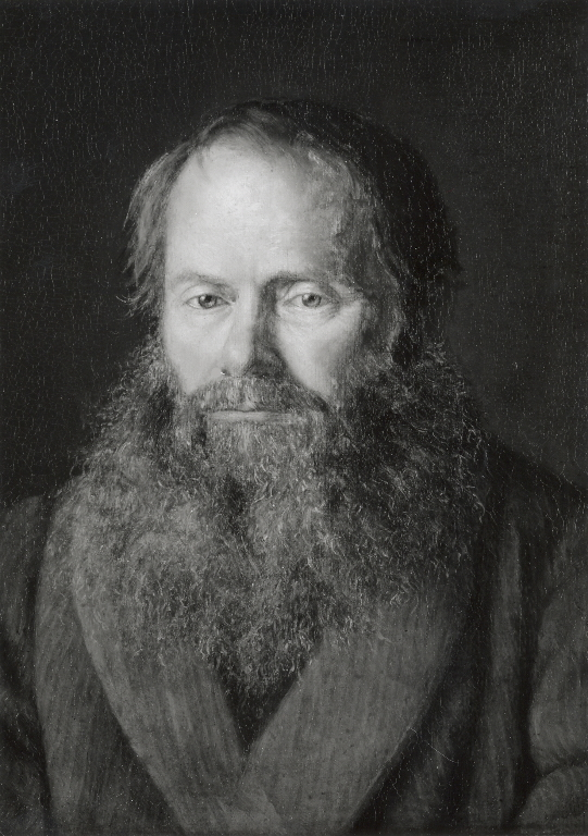 P.S. Kroeyer (1851-1909), Portraet af zoologen, professor H.N. Kroeyer, kunstnerens plejefader, 1868